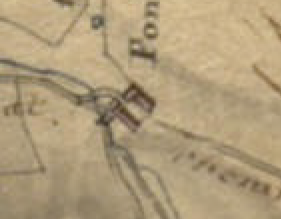 Font-romeu en el Cadastre Napoleònic del 1812 (Arxius Departamentals dels Pirineus Orientals)